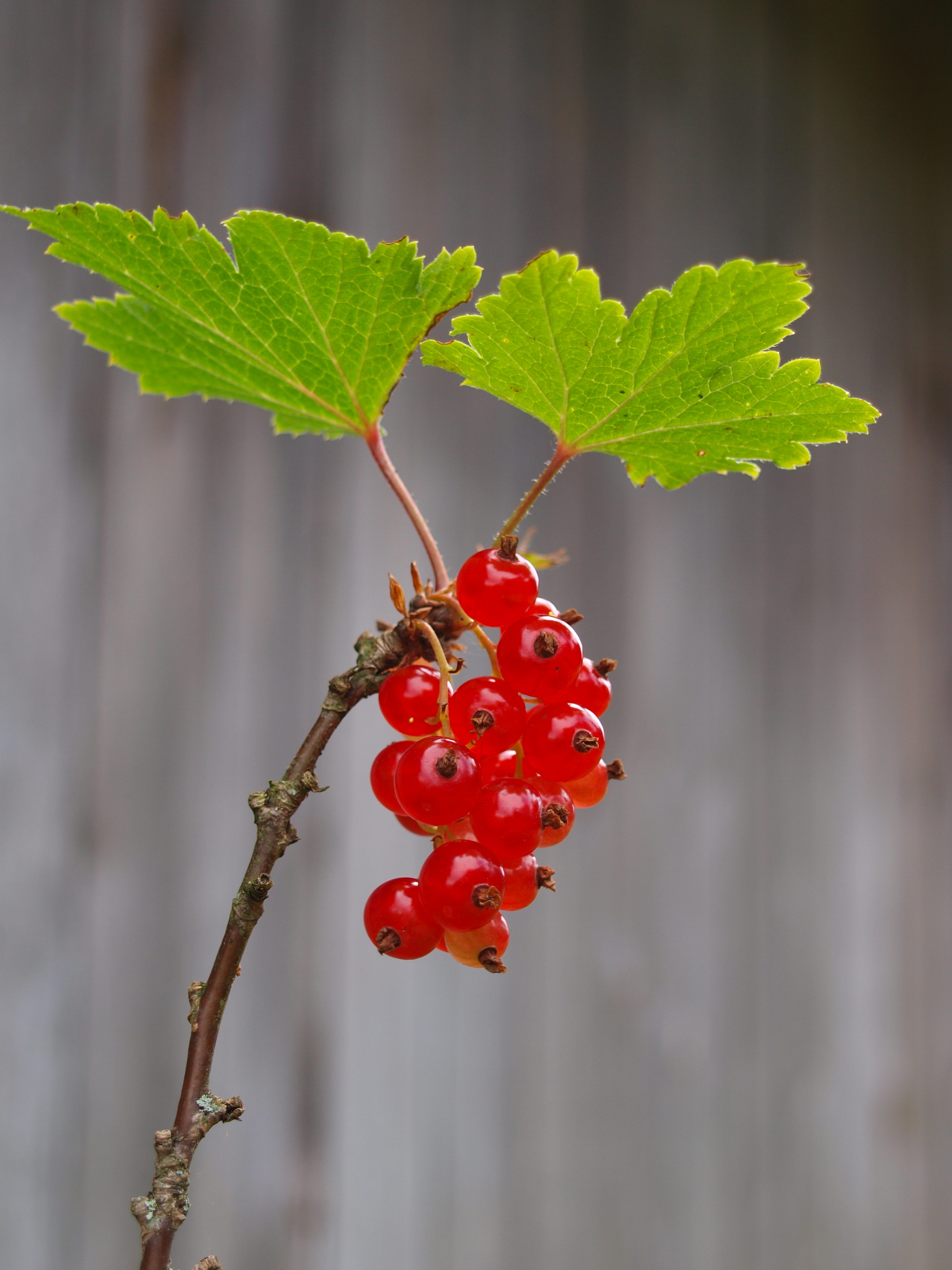 Pildil punane sõstar